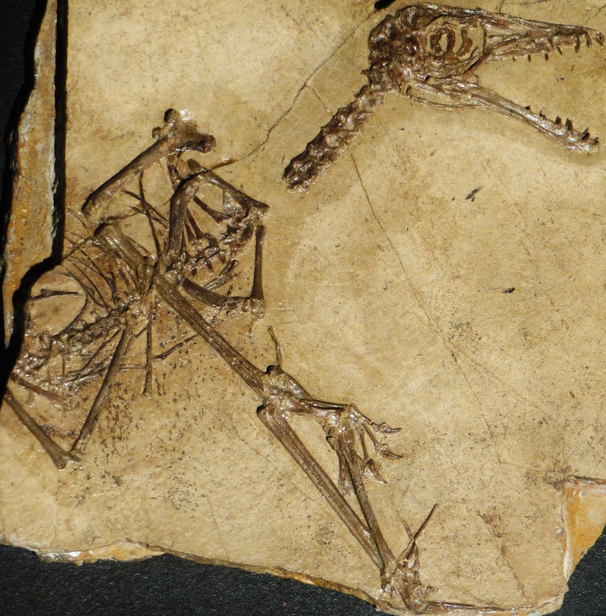 Fossil of Sordes, an extinct reptile- Took the picture at Dinosaurium, Prague